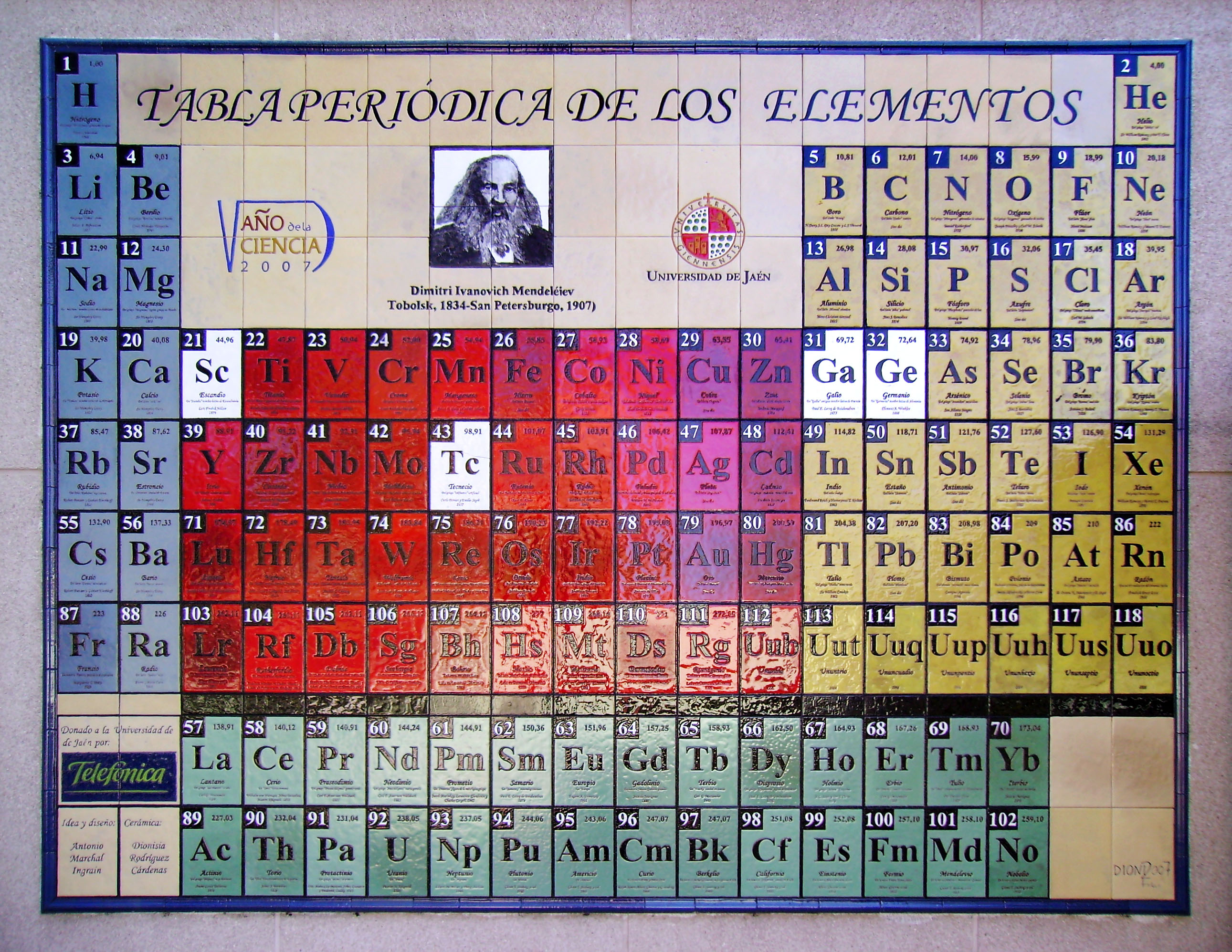 Tabla periódica del exterior de la Facultad de Ciencias Experimentales de la Universidad de Jaén.